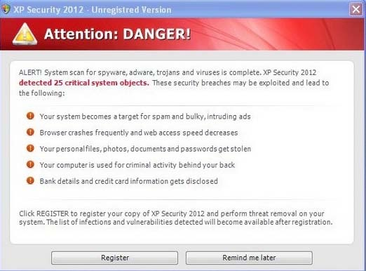 Монгол: Pop up window